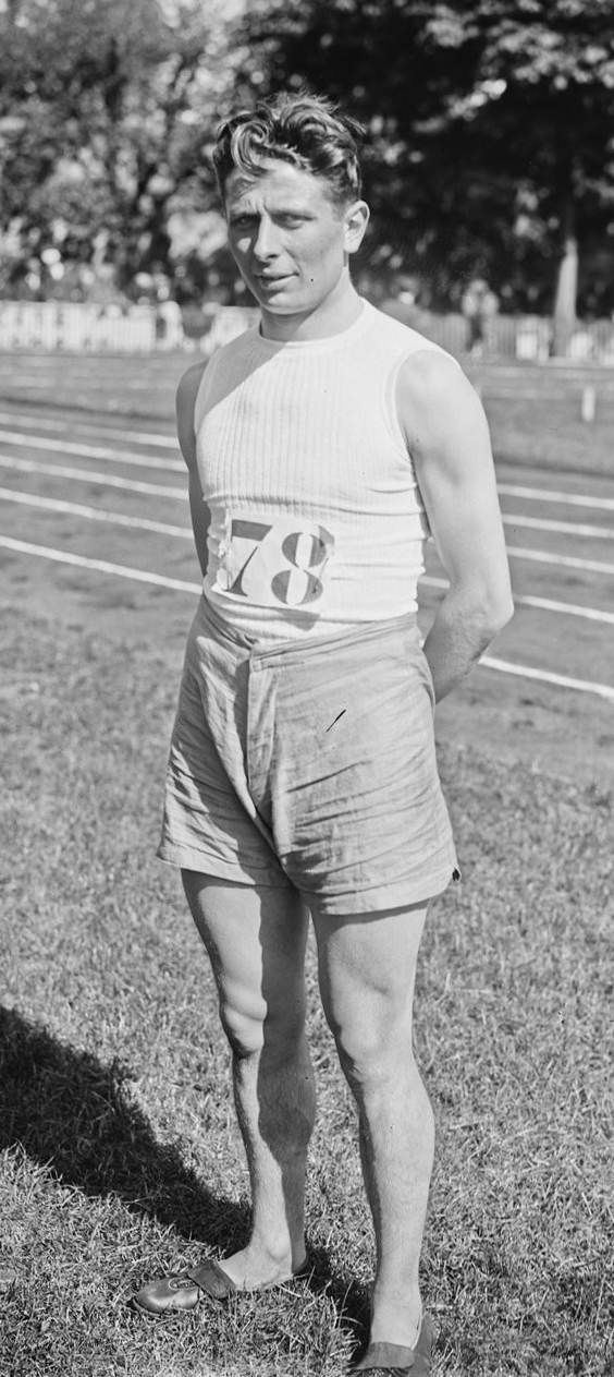 14-5-22, meeting du printemps [athlétisme] à Colombes, Lorain, gagnant du 80 m plat